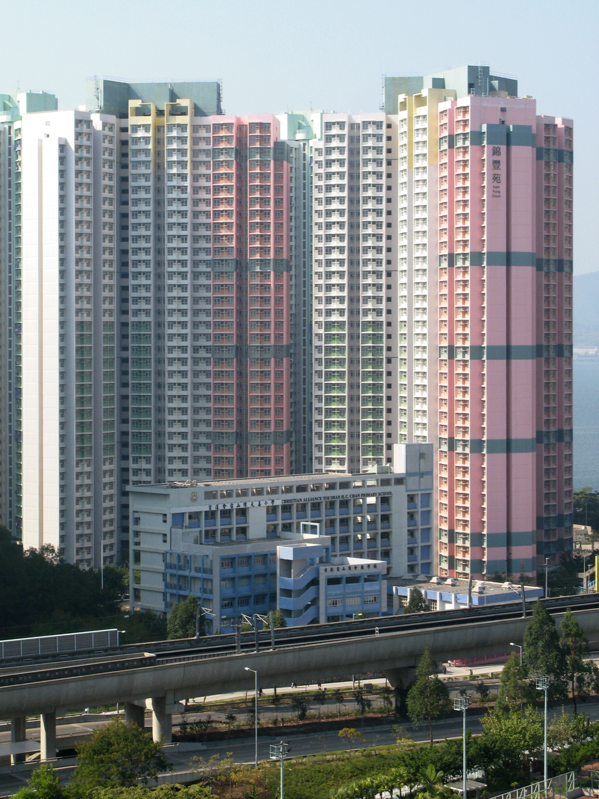 Kam Fung Court 錦豐苑 錦荷閣及錦蘭閣